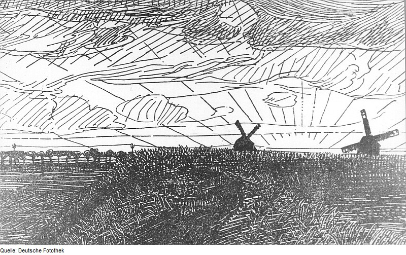 Original image description from the Deutsche Fotothek Windmühlen, Zeichnung von Rudolf Sievers/Braunschweig, aus: Heimatkalender Bad Liebenwerda, 1915